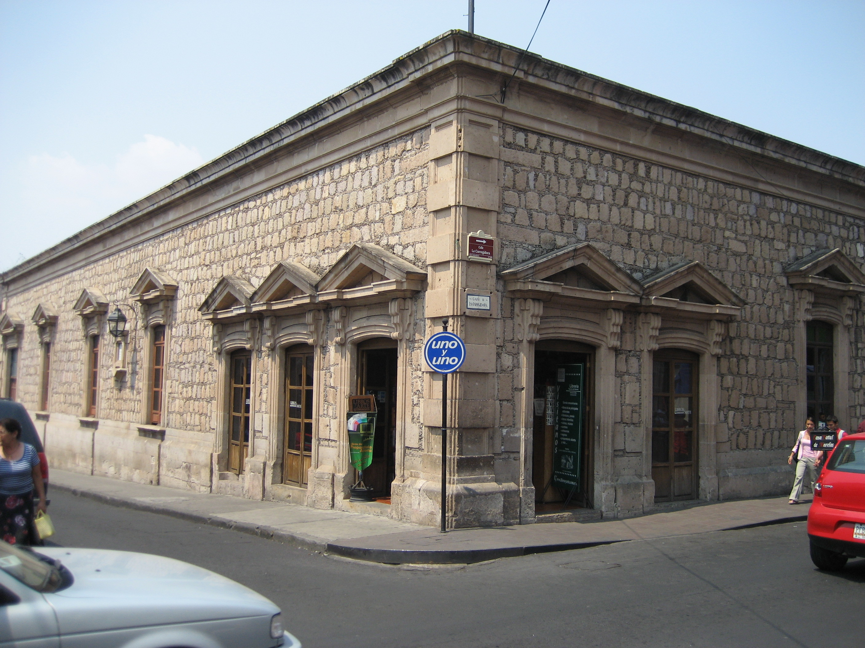 Vista exterior de la Casa Natal de José María Teclo Morelos Pérez y Pavón